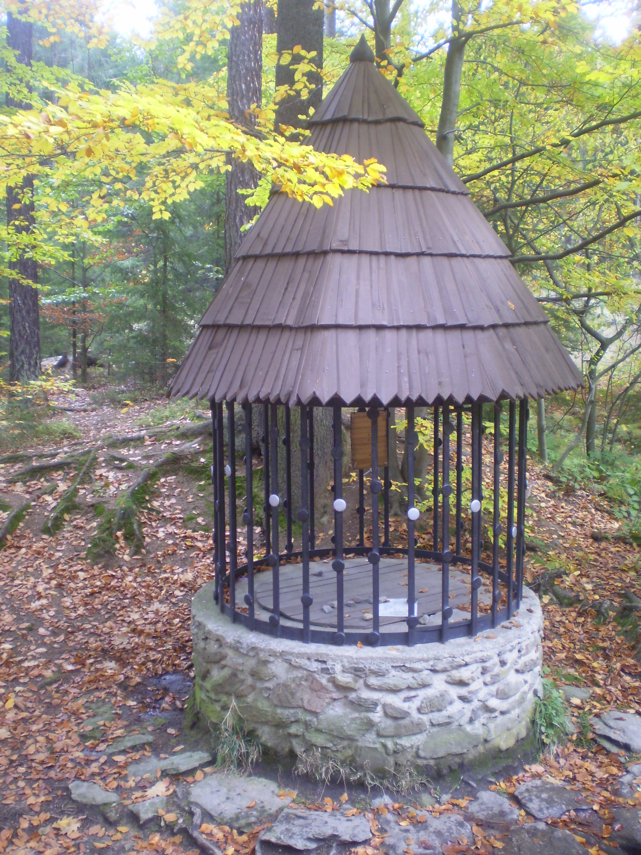 Stříbrná studánka u Křemešníku, nedaleko myslivny Korce